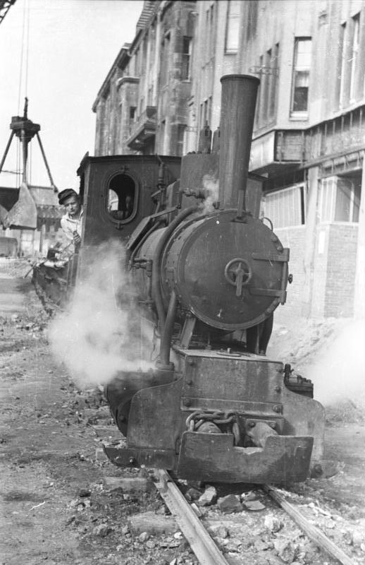 "Elias" dampft für den Wiederaufbau. Straßenschüttung in der Düsseldorfer City. "Baulok"